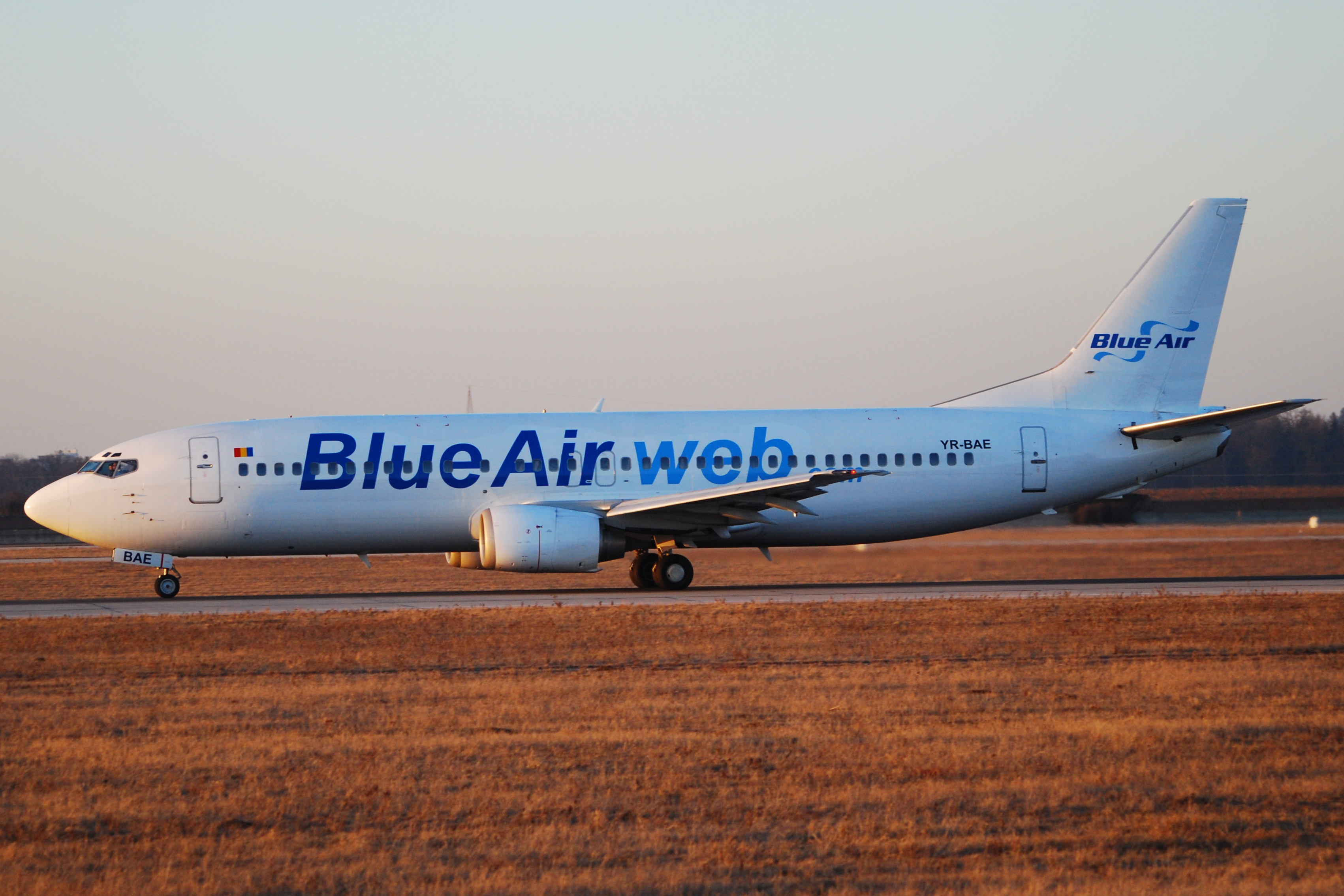 YR-BAE